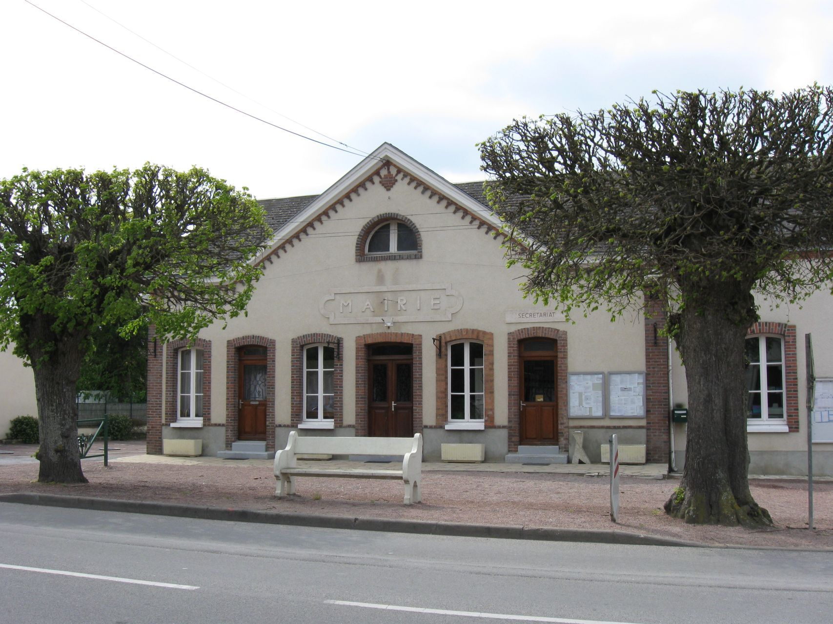 Mairie de Fontenay-sur-Loing (Loiret , région Centre)